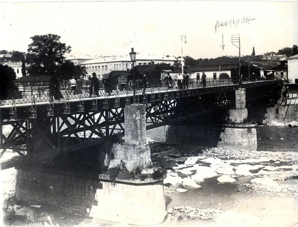 ქუთაისის თეთრი ხიდი. 1900-იანი წლები. ძველი არქივიდან. ავტორი უცნობია.